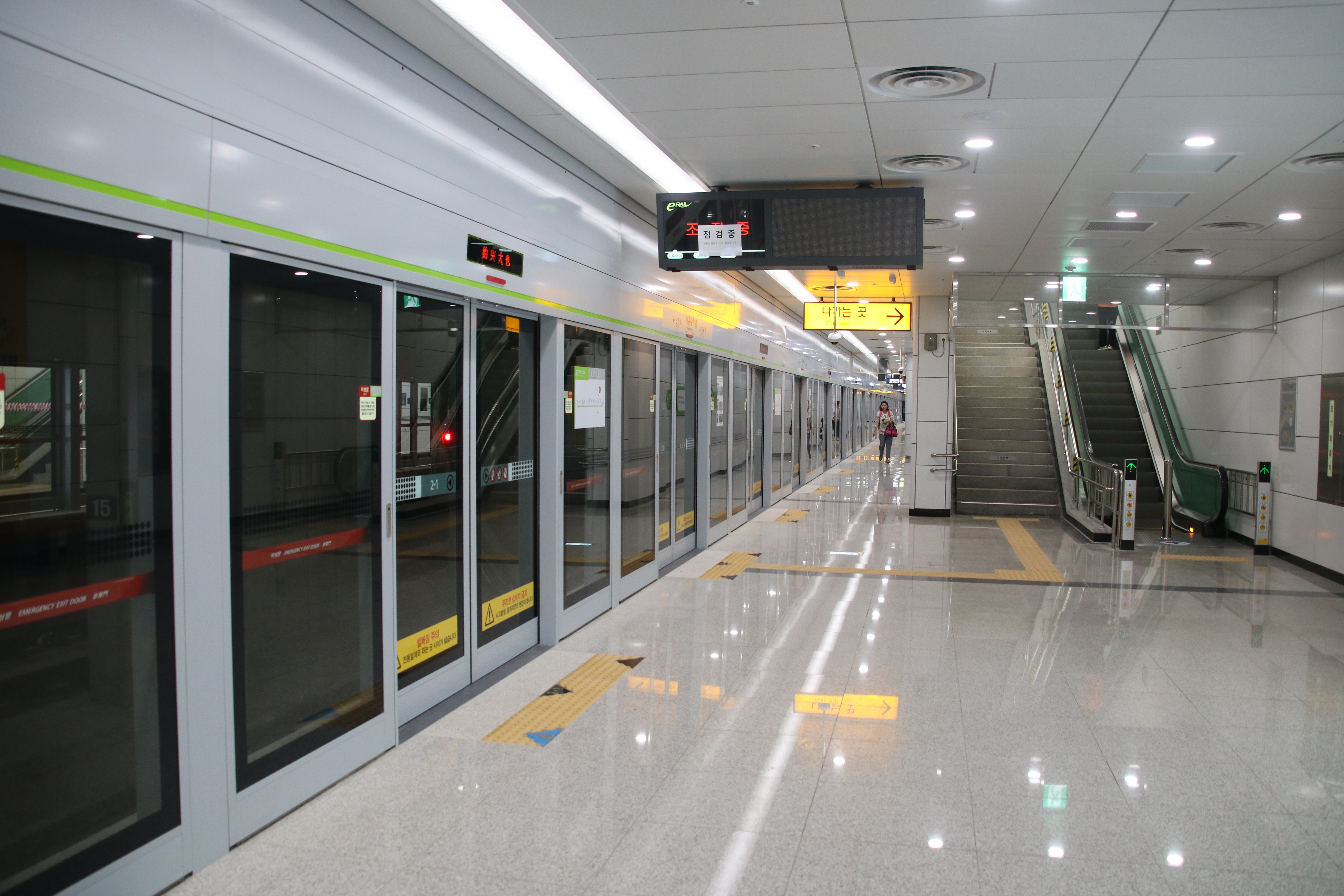 시흥대야역 승강장